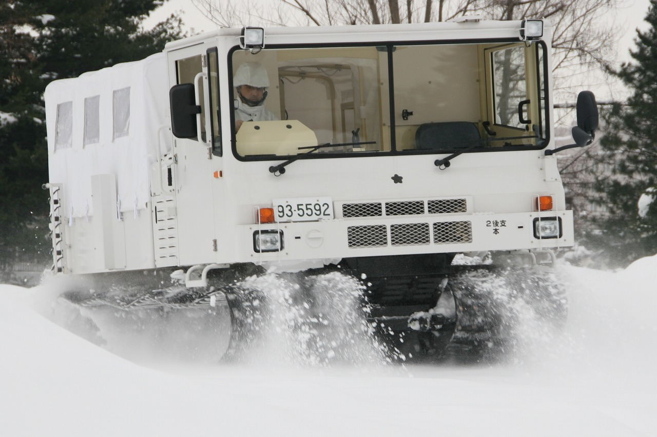 [乗員]10人 [車両総重量]5.0t [全長]4.65m [全幅]2.25m [全高]2.38m [最大積載量]1.0t [最高速度]45km/h [エンジン] 水冷4サイクル4気筒 ディーゼル機関 [製作]大原鉄工所 積雪地における各種装備品、補給品などの積載、けん引等に使用されるもので、雪上走行のほか、除雪堅硬道の走行ができる。